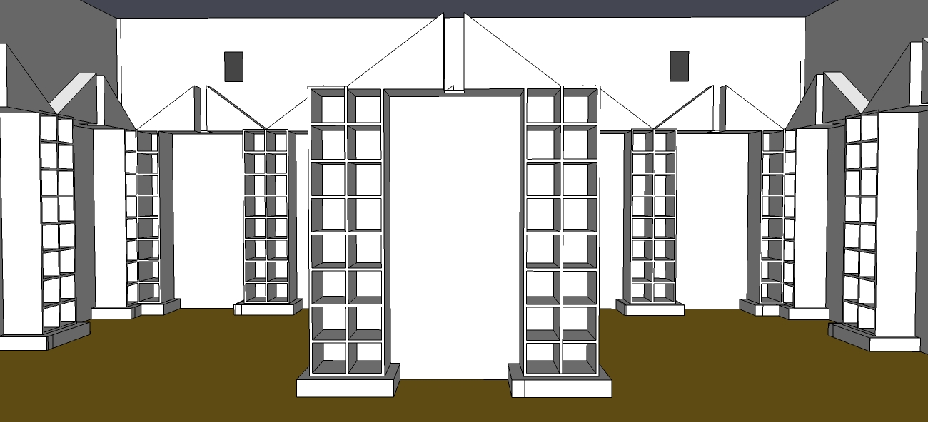 Vista dell'allestimento L'interno dopo la forma dell'utile, presentato all'interno della mostra "la sistemazione del design" alla XVI edizione della Triennale di Milano